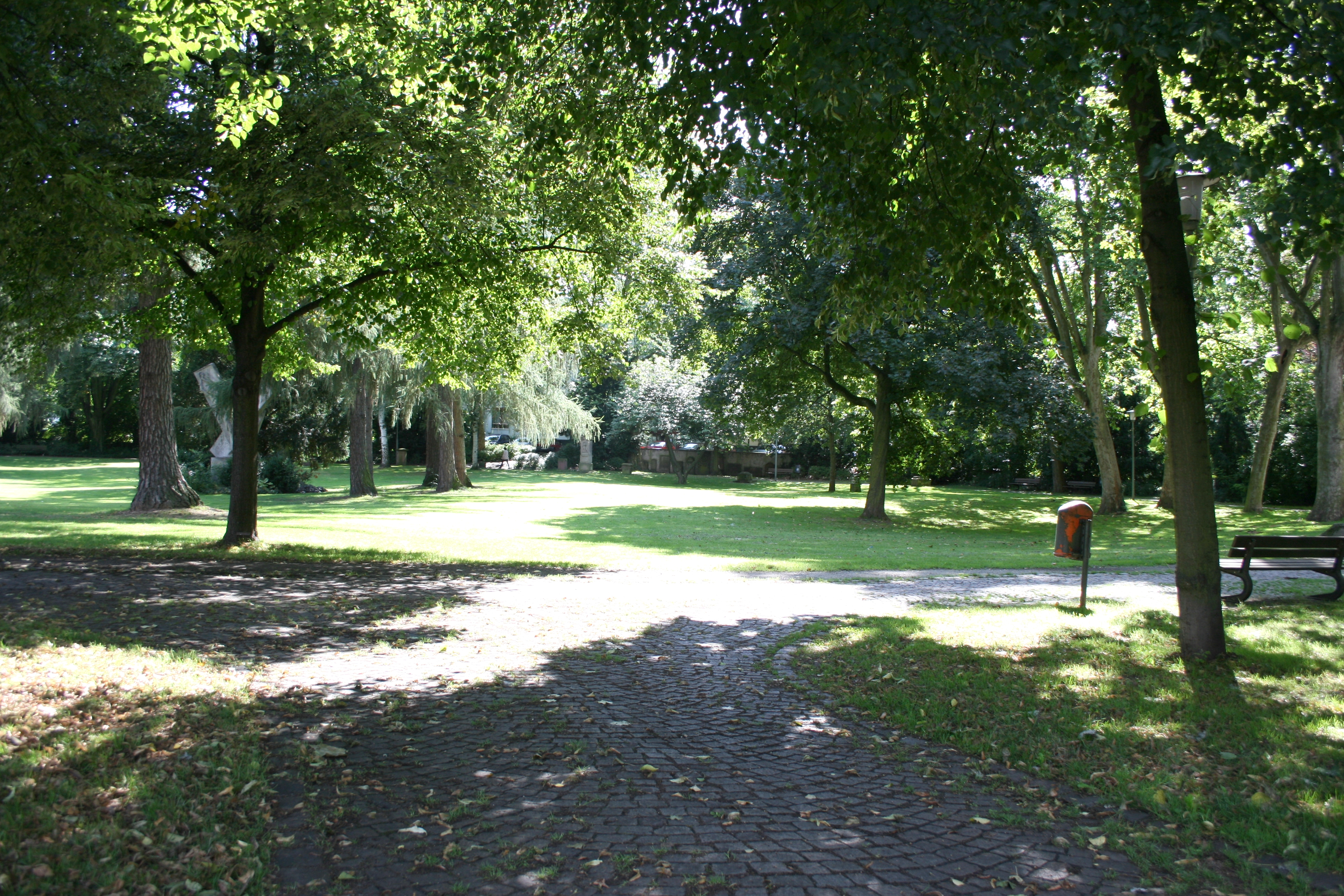 Alter Französischer Friedhof in Hanau, heutiger Zustand. Ansicht von Norden.